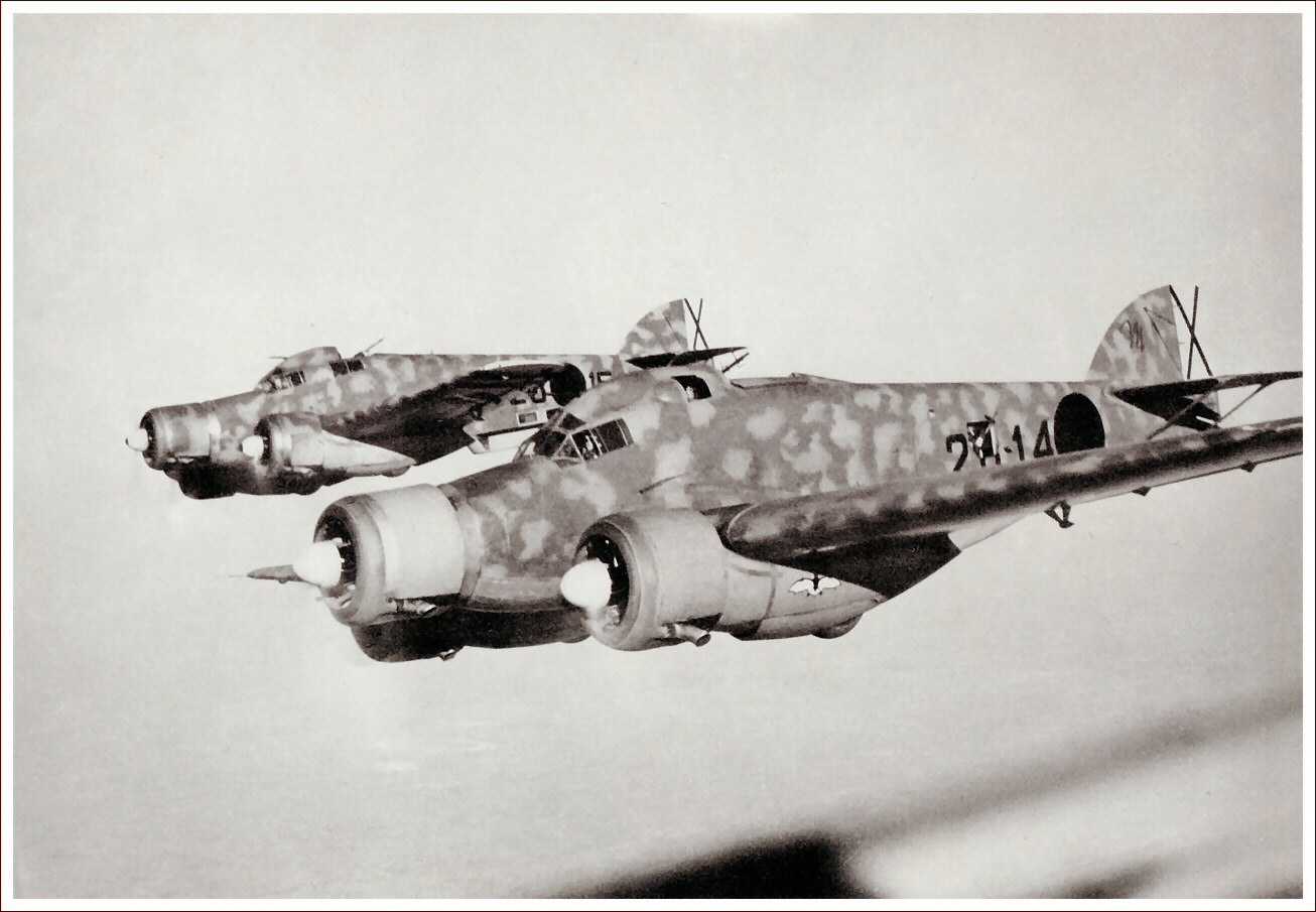 Савоя-Маркетти SM.79